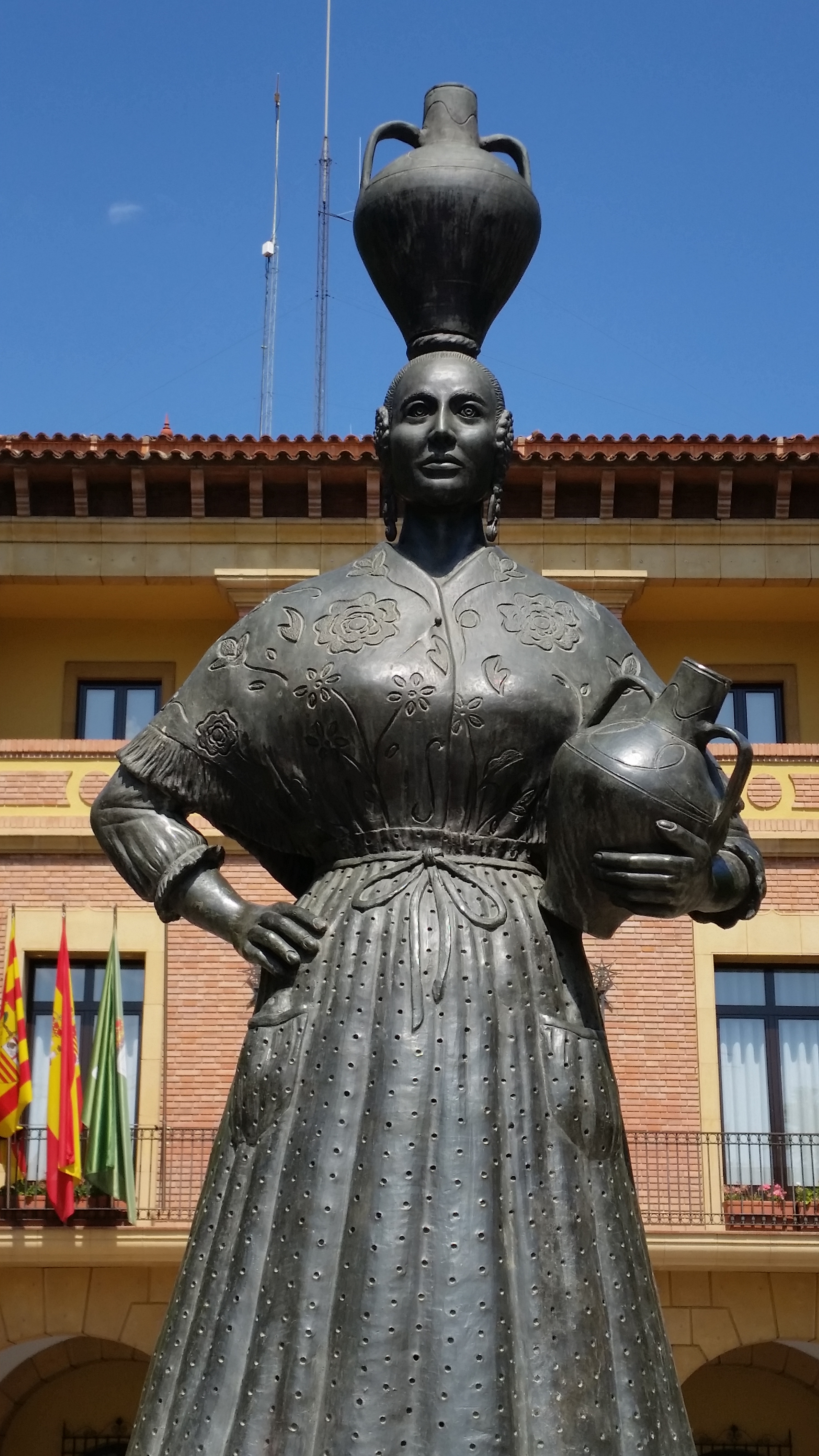 Fraga - Monumento a las donas de faldetes